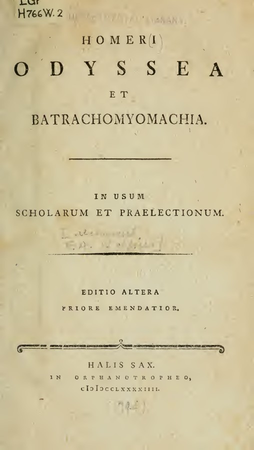 Homeri Odyssea et Batrachomyomachia. - Halis Sax : In Orphanotropheo, 1794. - XXXIV, 478, [2] p. ; 21 cm. Frontespizio